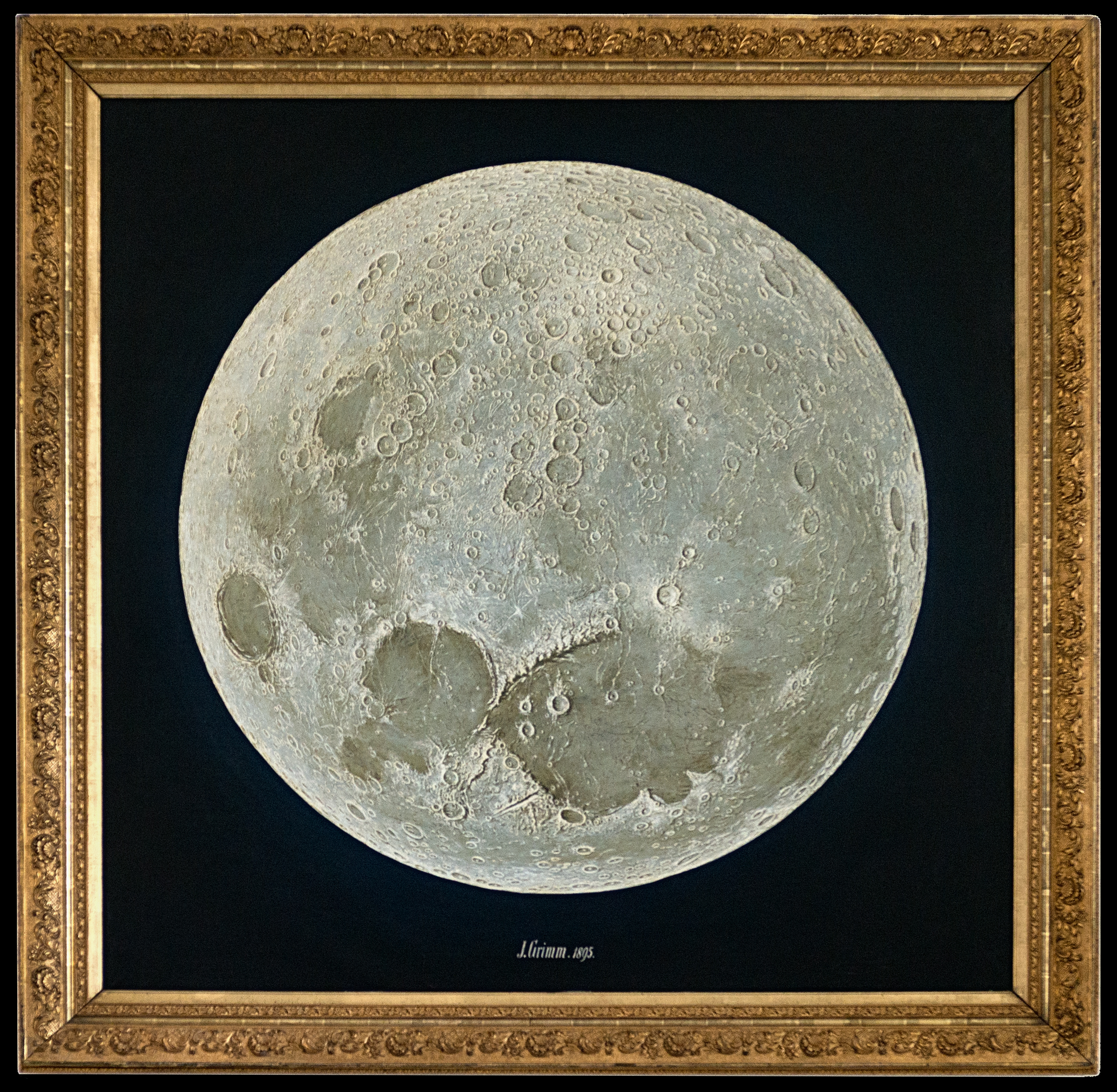 Mondgemälde von Julius Grimm aus dem Jahre 1895. Öl auf Leinwand, Gemäldesammlung der Universität Tübingen